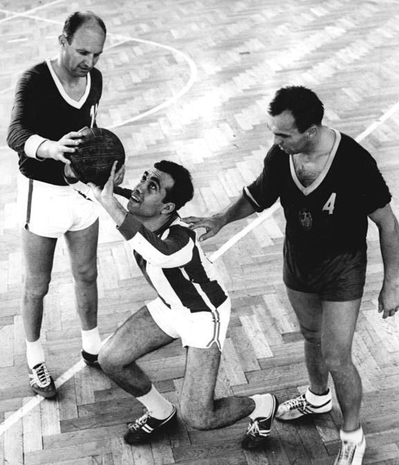 Leipzig, DHfK, Volleyballtraining Zentralbild Kluge 4.11.1969 Leipzig: Libanesen studieren an der DHfK. Asaaf Mohamed (Libanon, mitte) mit seinen beiden Leipziger Ausbildern Klaus Scheiter (links) und Rolf Bürger (rechts) während der praktischen Ausbildung im Volleyball. Im Rahmen des traditionellen achtmonatigen Trainerlehrganges für Ausländer an der Leipziger DHfK erwerben zur Zeit (bis November 69) gemeinsam mit 80 anderen Trainern aus 12 Ländern zwei libanesische Sportfreunde das Trainerdiplom.